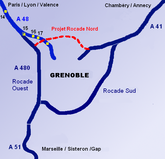 autoroute A48 près de Grenoble avec ses échangeurs